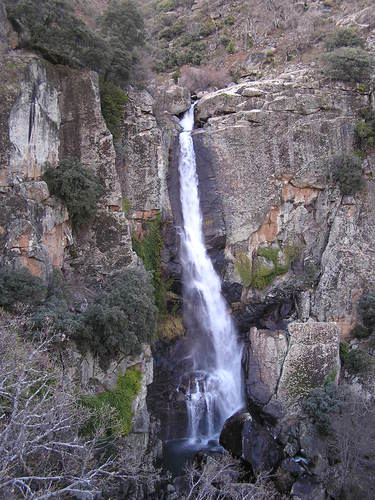 Salto de agua en la garganta de la Ventosa, en Villanueva de la Vera (Cáceres)